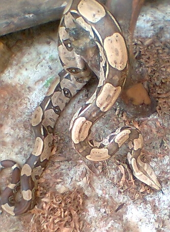 Boa constrictor constrictor em seu habitat natural. Belém - PA